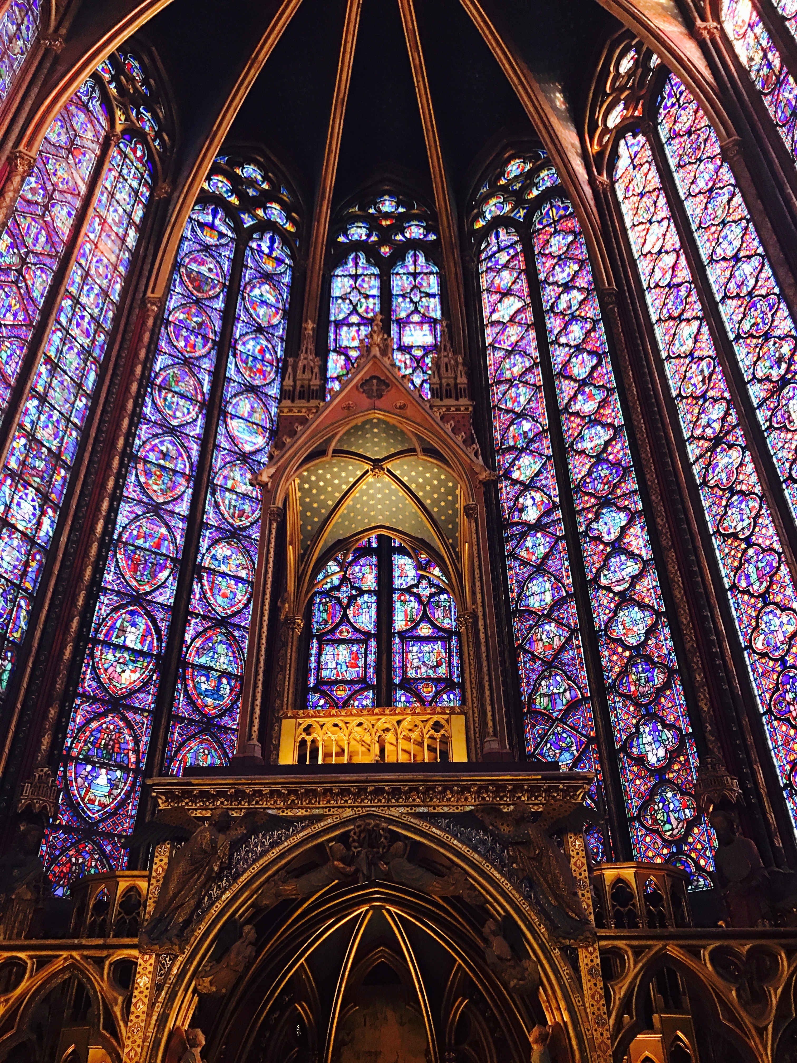 sainte chapple image